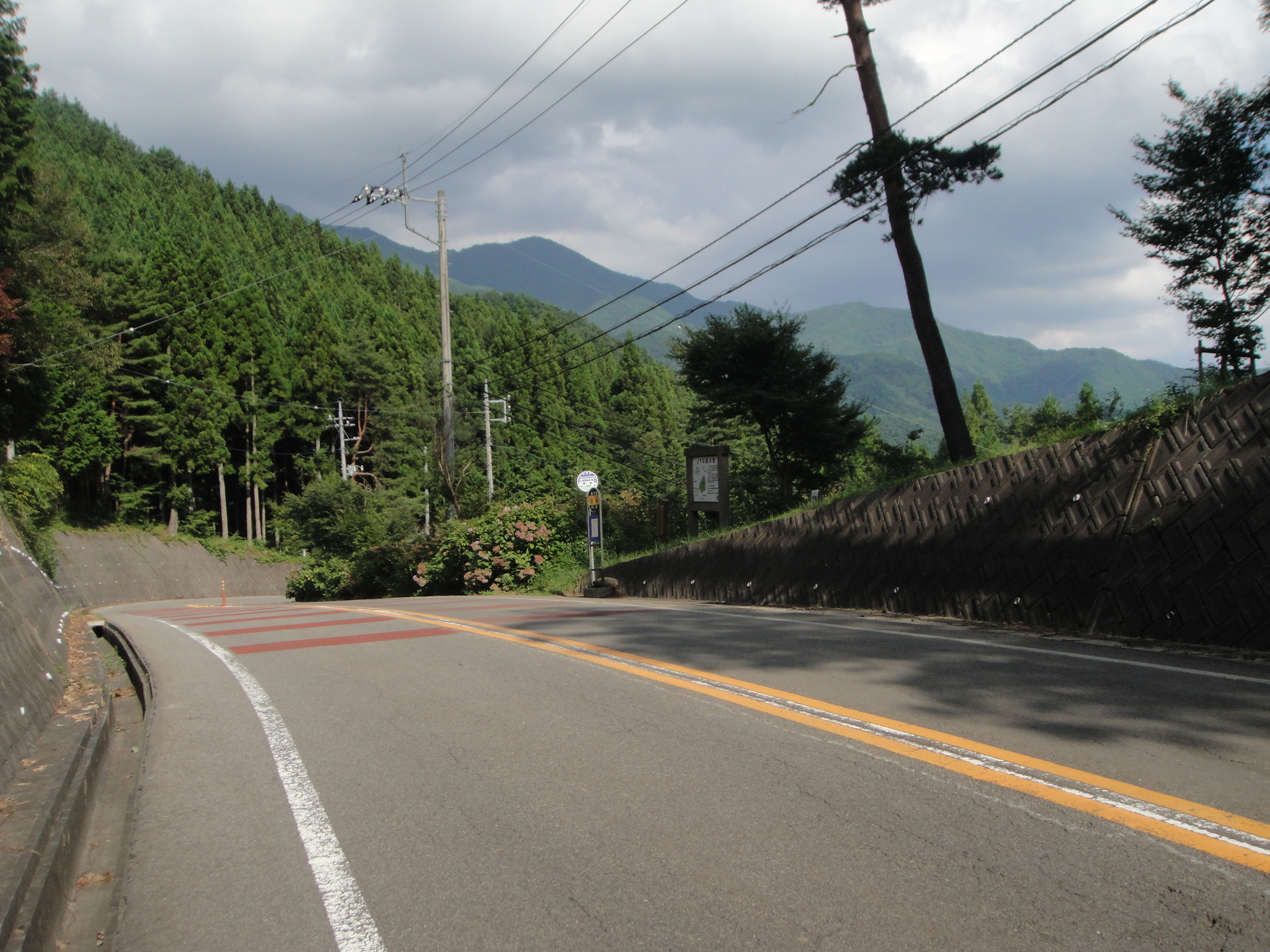 鶴峠を上野原市方面に向かって撮影。